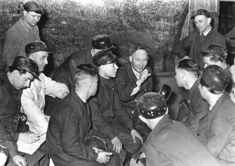 Sondershausen, Zeche "Glück auf", Bergarbeiter, Besprechung Zentralbild TBD-Torka 25.2.1954 Eine Delegation Sowjetsoldaten besuchte am 36. Jahrestag der Sowjet-Armee den Kalischacht "Glück auf" in Sondershausen. Am 23.2.1954, dem 36. Jahrestag der Sowjet-Armee besuchte eine Delegation der Sowjet-Armee den Kalischacht "Glück auf" in Sondershausen. Unter der Führung von Grubendirektor Herbst fuhren die Sowjetsoldaten vor Ort. UBz: Der sog. Festsaal, 700 m unter Tage, der früher den Grubenherren zu ihren Gelagen diente, ist heute der Klubraum der Kali-Kumpel unter Tage. Links (im weissen Schutzanzug) Grubenleiter Herbst.